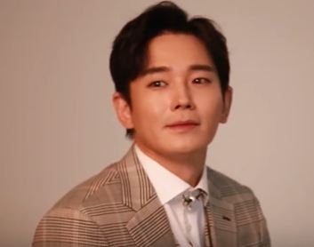 씬플레이빌 3월호의 커버를 장식한 뮤지컬 '그날들'의 오종혁, 온주완, 윤지성 배우! 무대가 아닌 화보 촬영장에서 만난 세 배우의 모습을 메이킹 영상에서 확인하시죠!